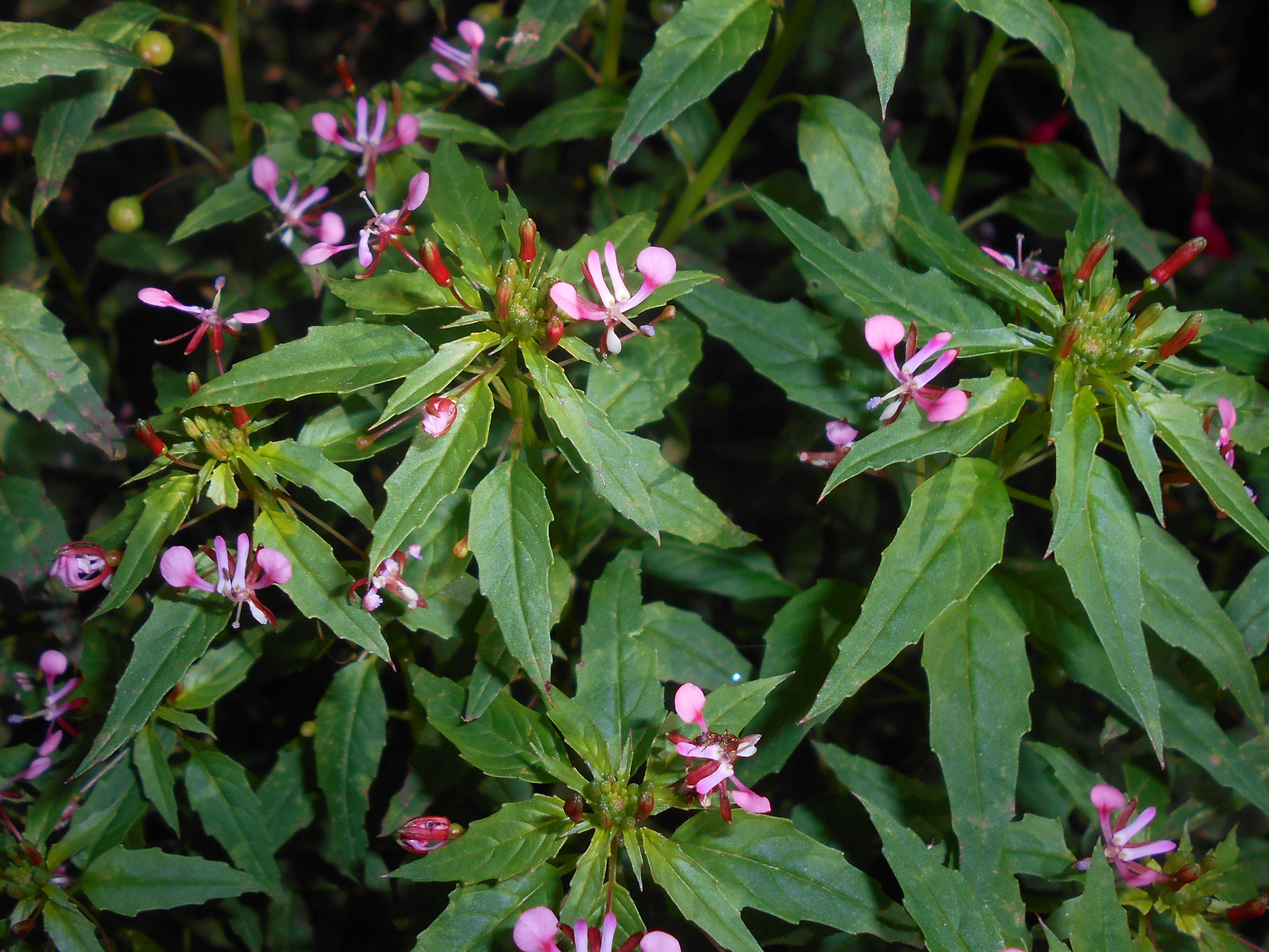 Lopezia coronata, Ogród Botaniczny Uniwersytetu Jagiellońskiego w Krakowie.